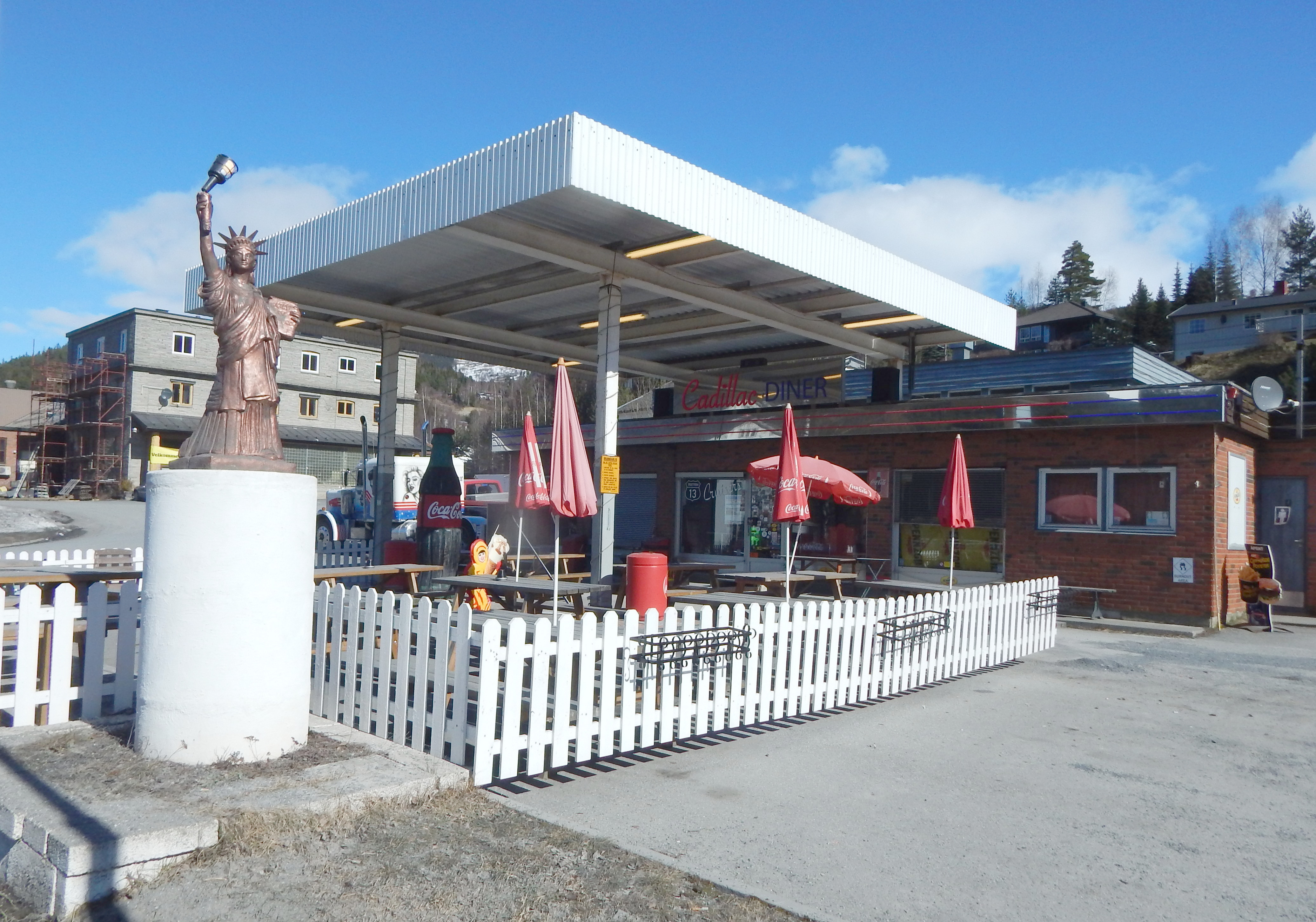 Amerikanskinspirert kultur i Tretten sentrum